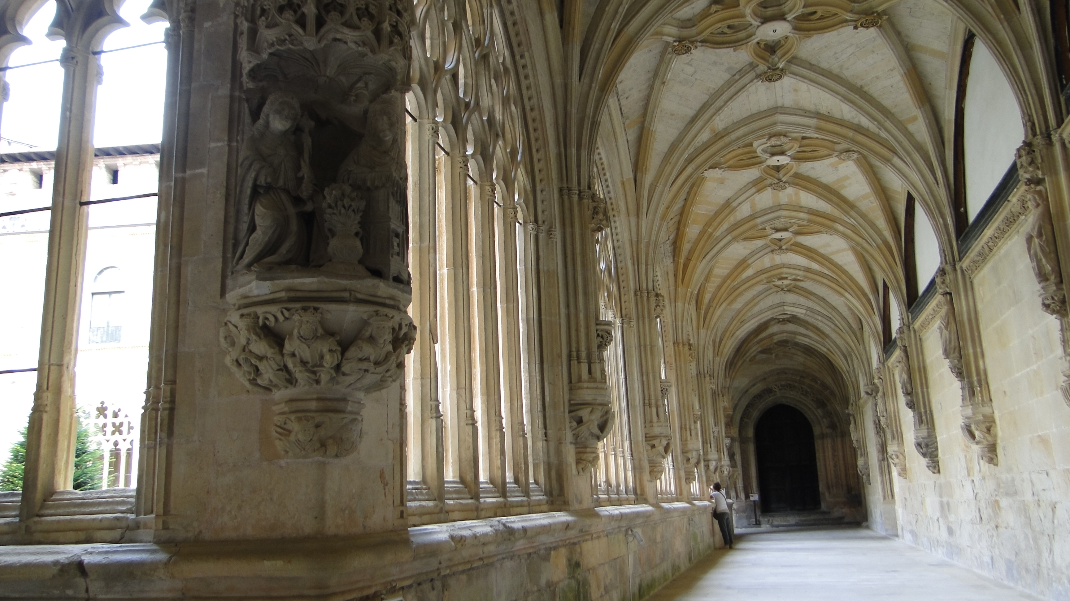 Claustro del Monasterio de San Salvador de Oña (Oña, Burgos)